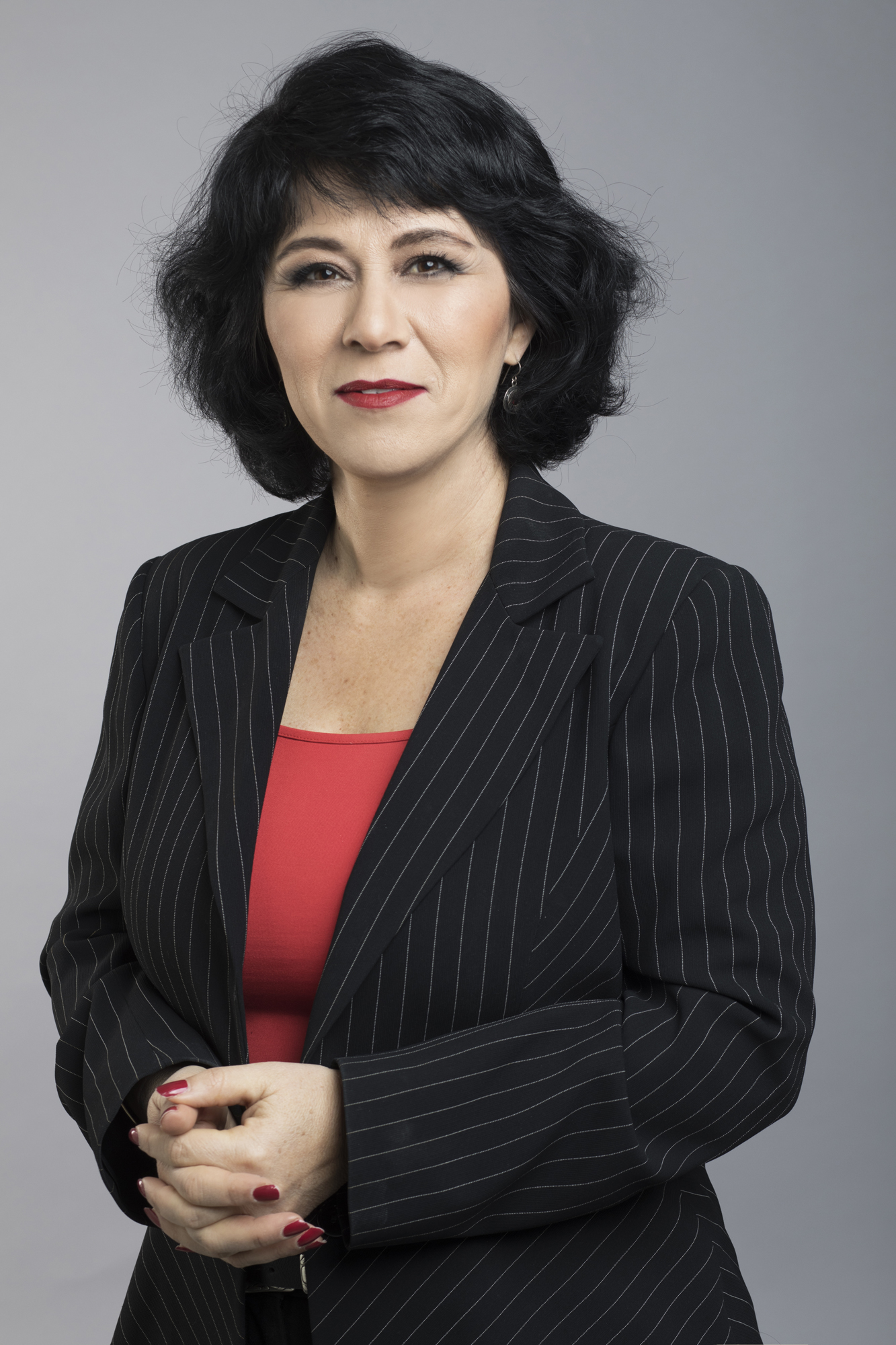 ד"ר חדוה בר Authority control : Q20742873 VIAF: 228354435 ISNI: 0000 0004 0239 6037 NLI: 000018799 Koninklijke: 191296791